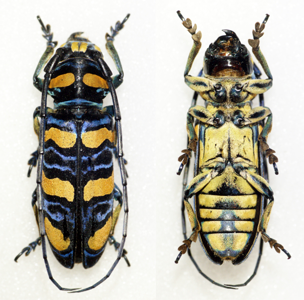 Kolbe,1897 Sex: Female Data: 12-2009 - Kwambe village - Kwambe Mts - Morogoro - Tanzania Size: ?